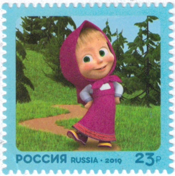 № 2557-2559. Современный российский кинематограф. Мультфильм «Маша и Медведь»